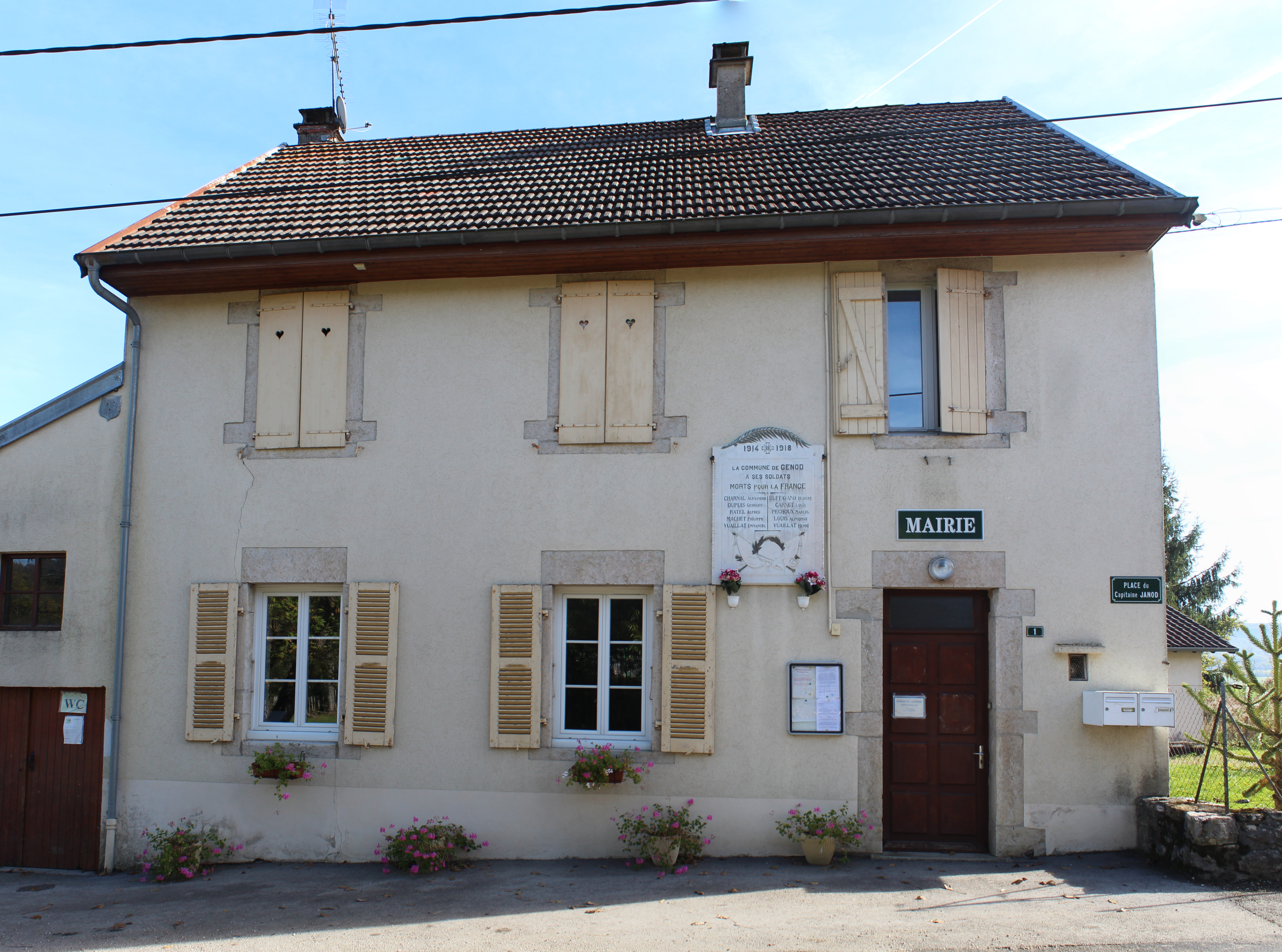 Mairie de Genod.